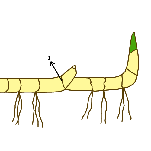 Morfología del tallo. Tipo: rizoma. Según Simpson (2005) Plant Systematics.